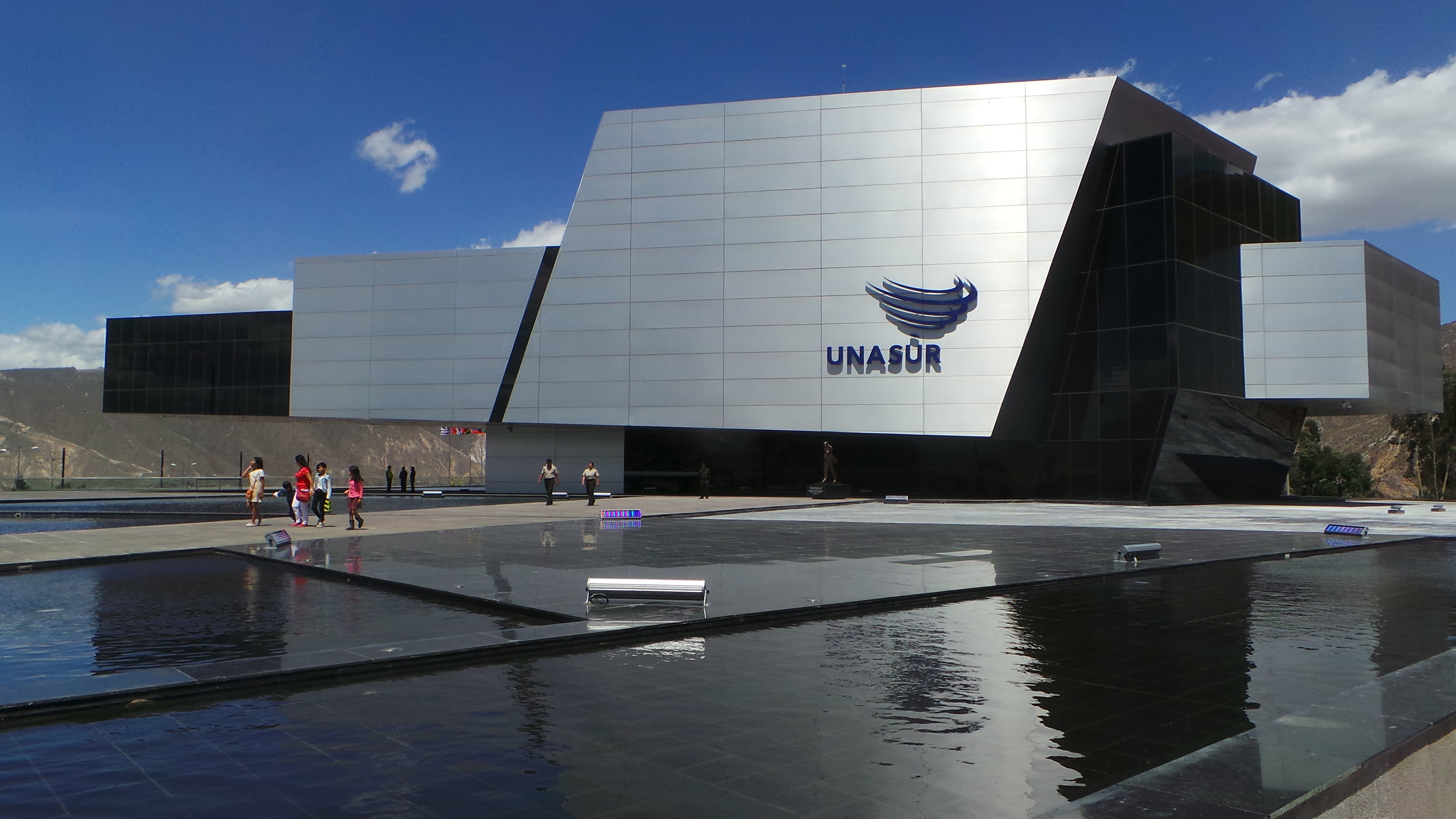 Sede de UNASUR inaugurada en diciembre de 2014 en Ecuador - La Mitad del Cielo